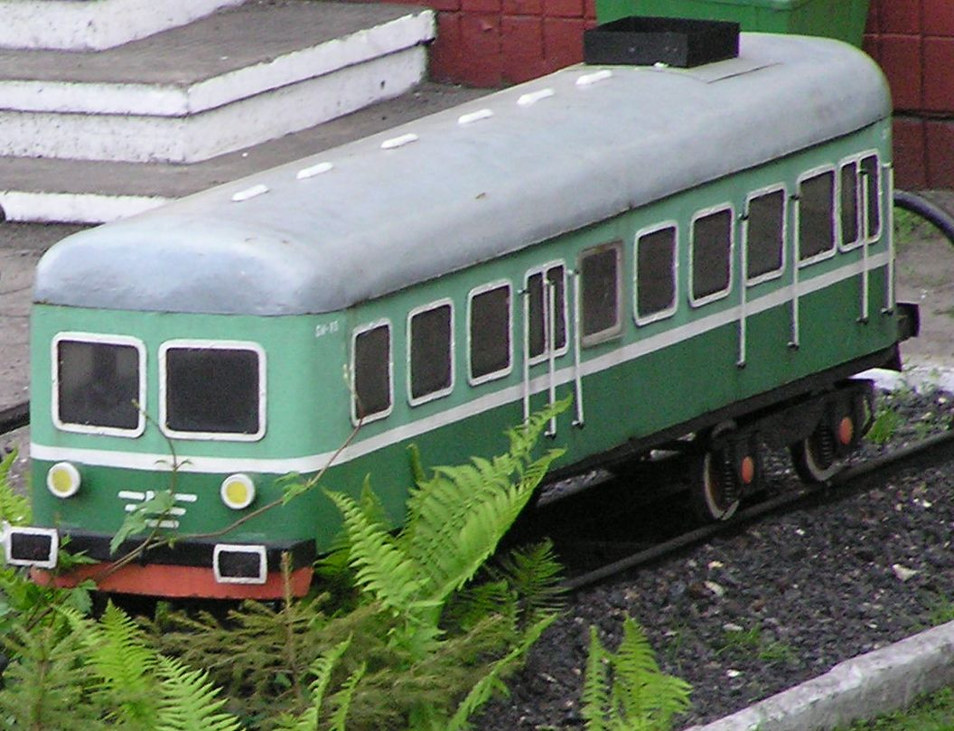 Model SN80 w parowozowni w Wolsztynie